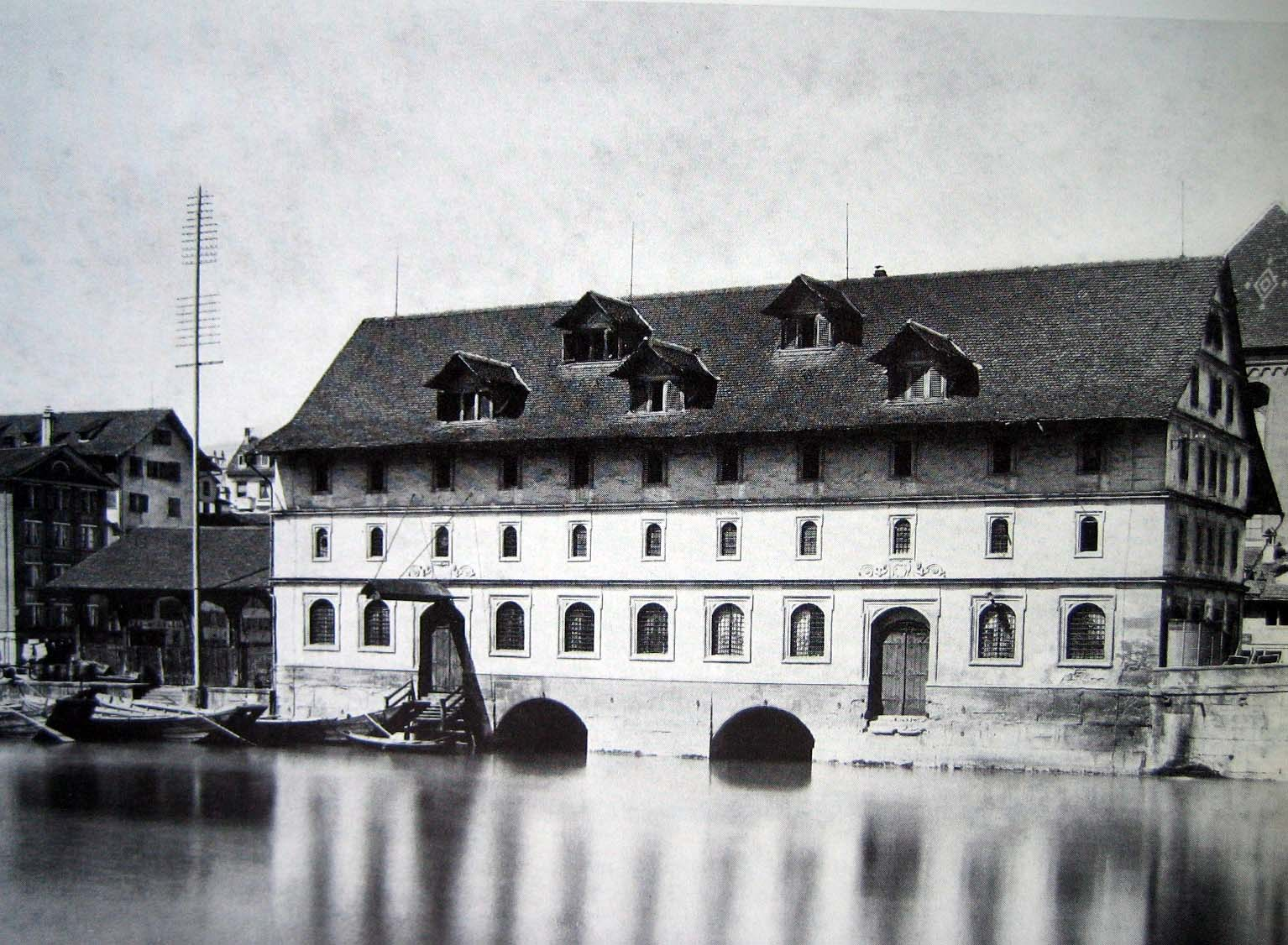 Das Korn-, ab 1840 Kaufhaus, erbaut 1620, abgetragen 1898, stand gegenüber dem Fraumünster an der Limmat